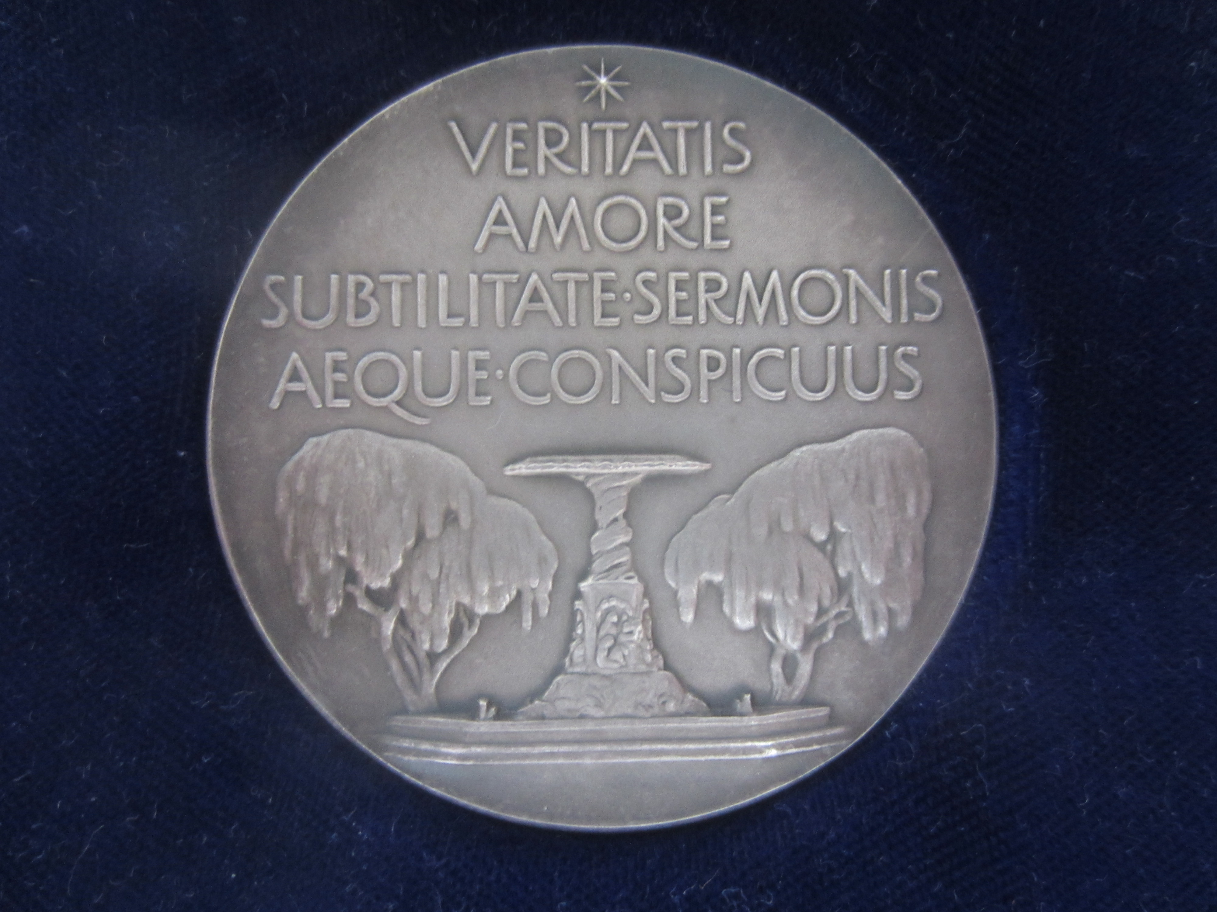 Hjalmar Söderberg, Svenska Akademiens minnespenning från 1950, frånsida. I svensk översättning är texten: "Sanningskärlek och språkligt mästerskap utmärkte honom i samma grad".